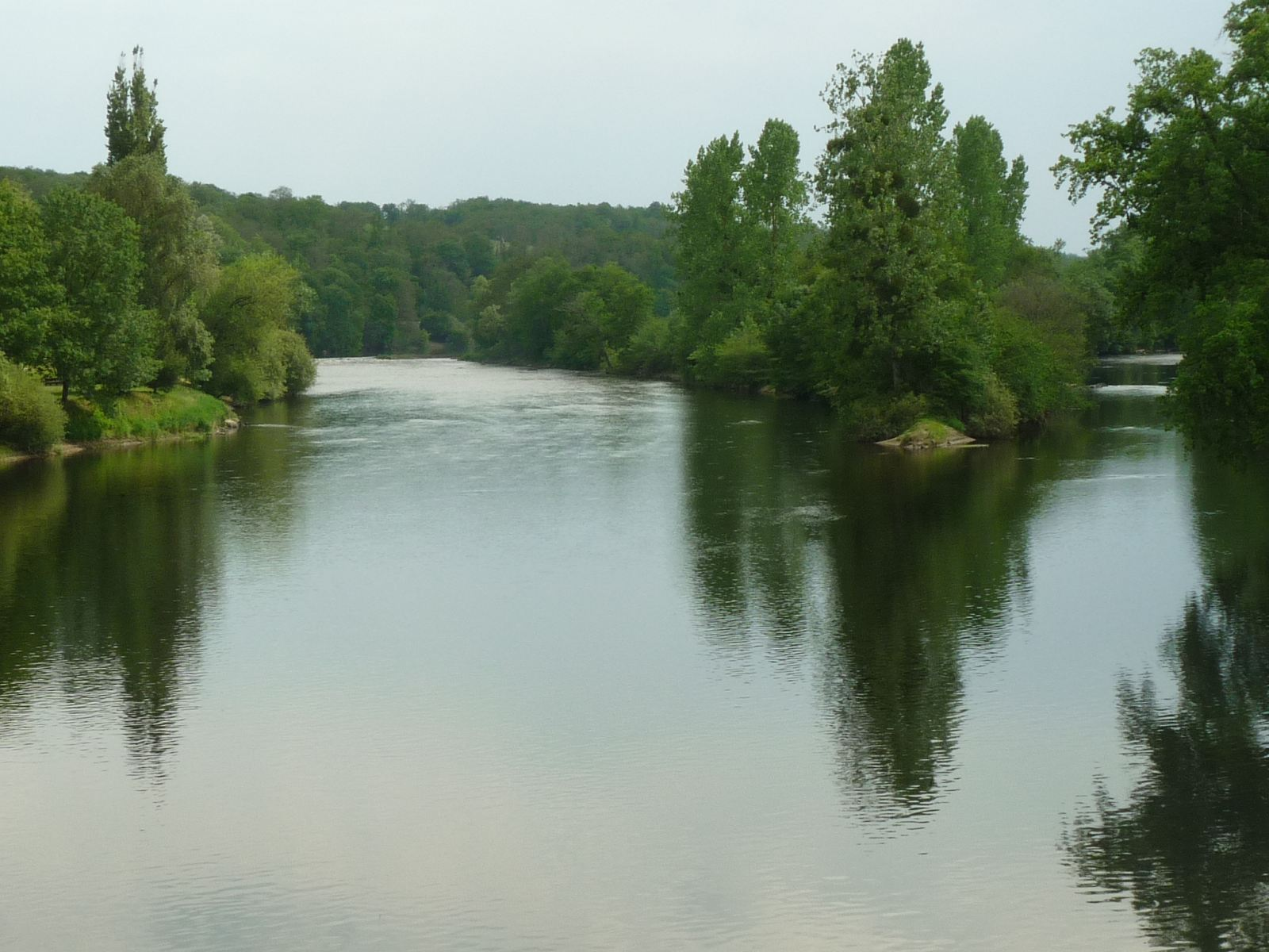 la Vienne à St-Germain-de-Confolens, Charente, France